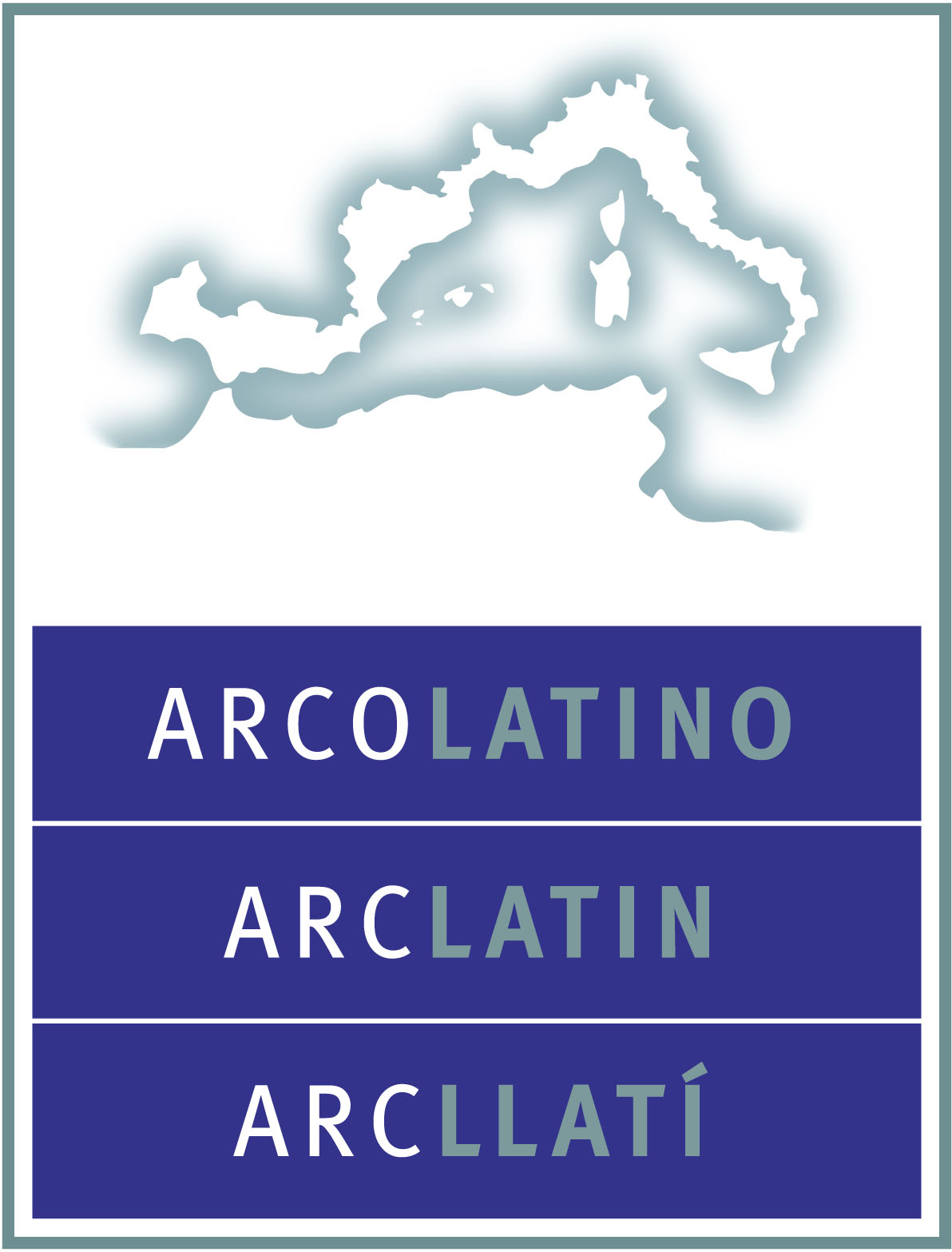 Logo de la red Arco Latino - todos derchos reservados